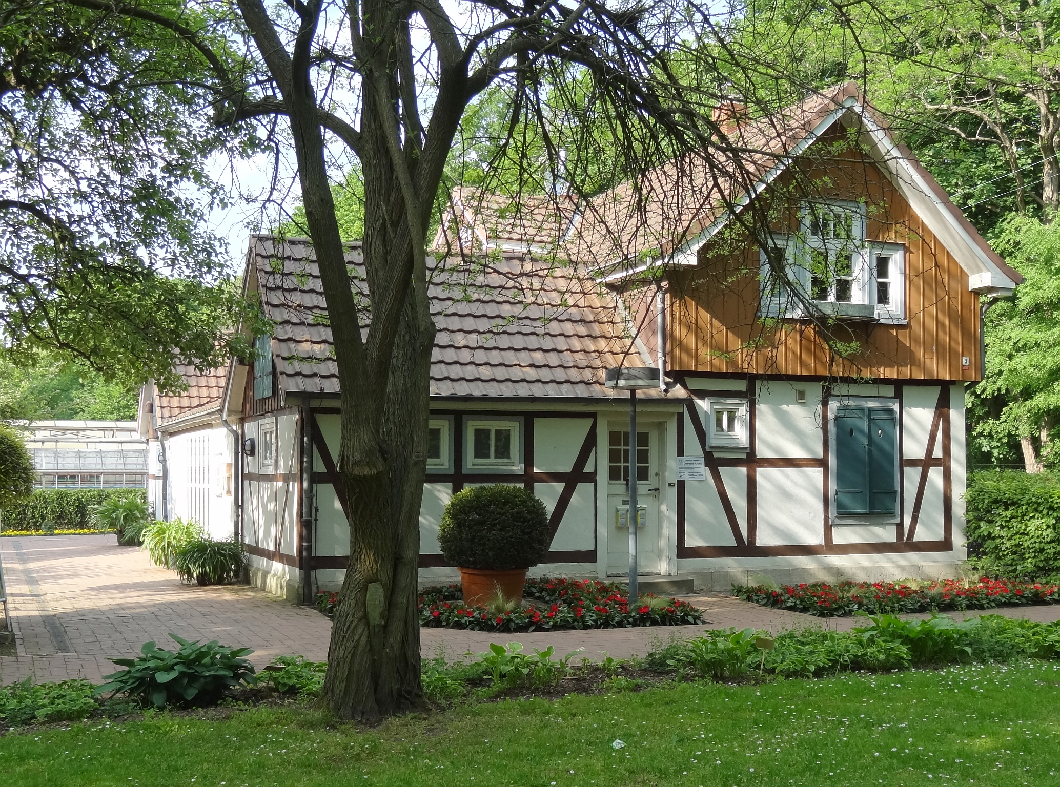 Gärtnerhaus und Doweseearchiv im Schul- und Bürgergarten, Braunschweig.